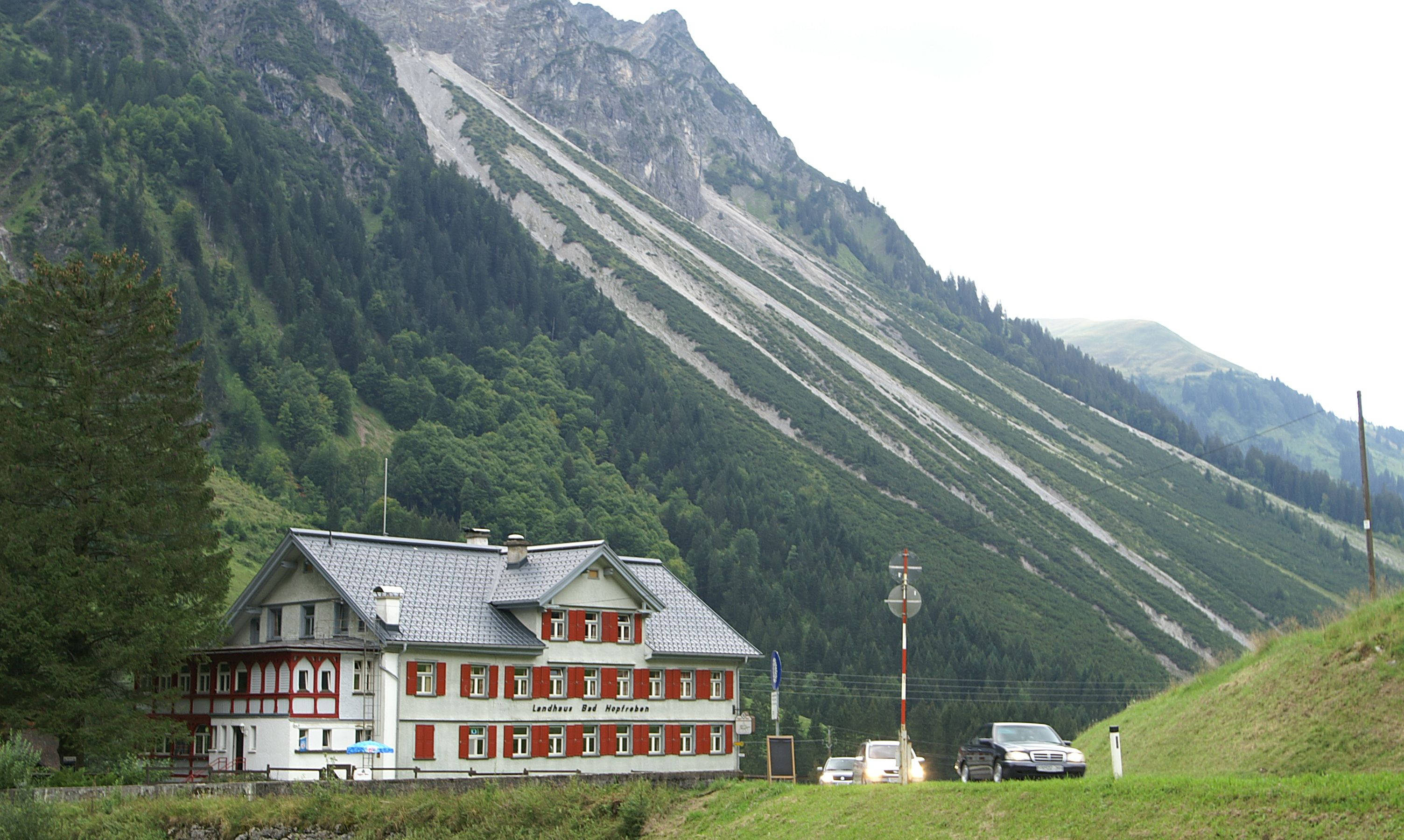 Outdoor & Sporthotel “Bad Hopfreben” am Fusse der Künzelspitze am Ortende von Schoppernau (Hinterhopfreben Nr. 140) im Bregenzerwald *** erbaut 1899 vom Bauunternehmer Johann Bertolini.